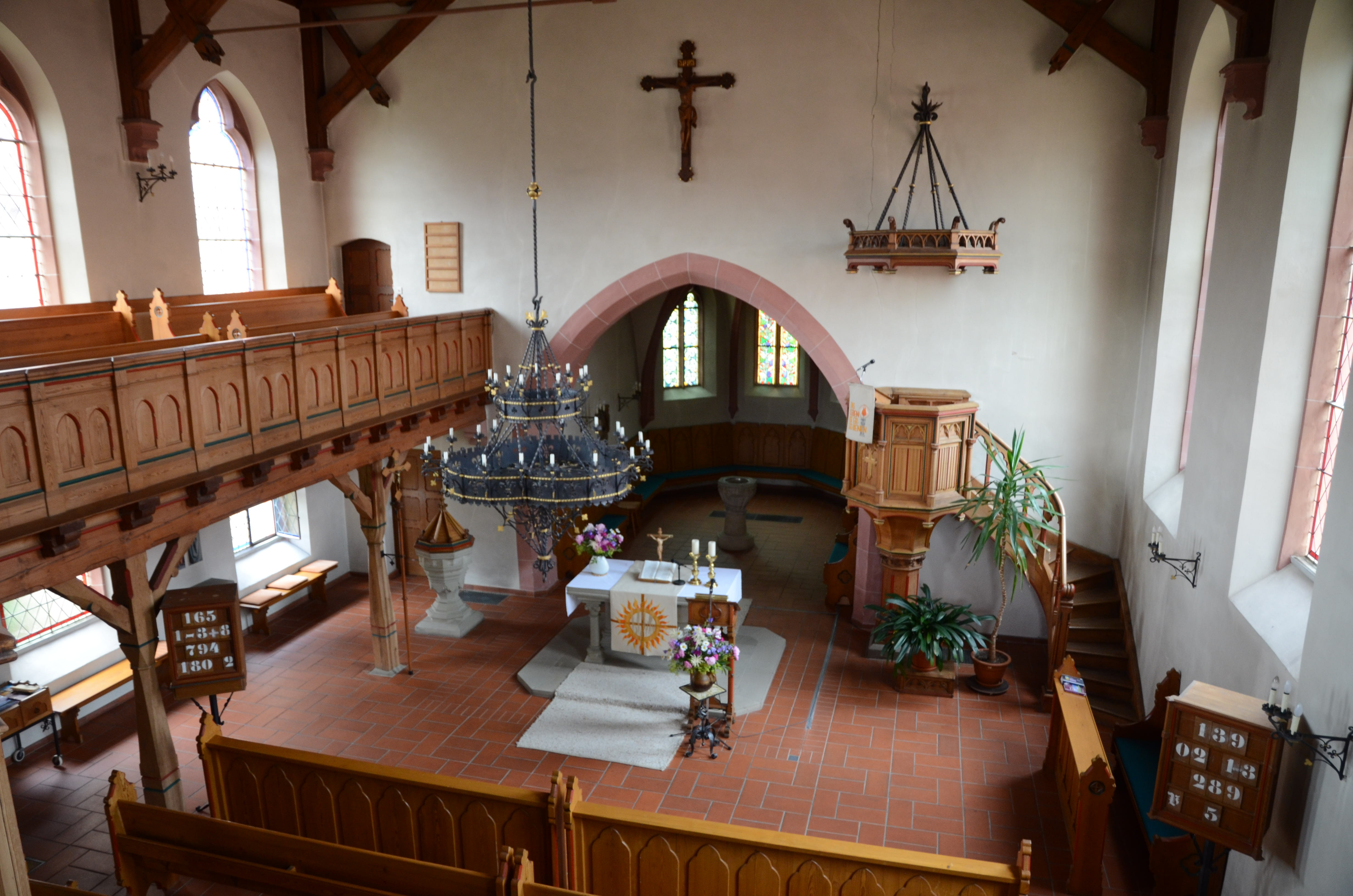 evang.-luth. Kirche in Eichfeld